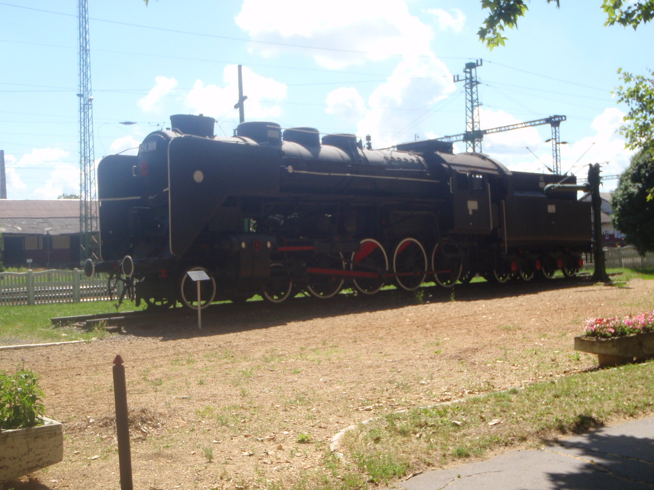 Nagykanizsa vasútállomás előterében kiállított MÁV 424.309